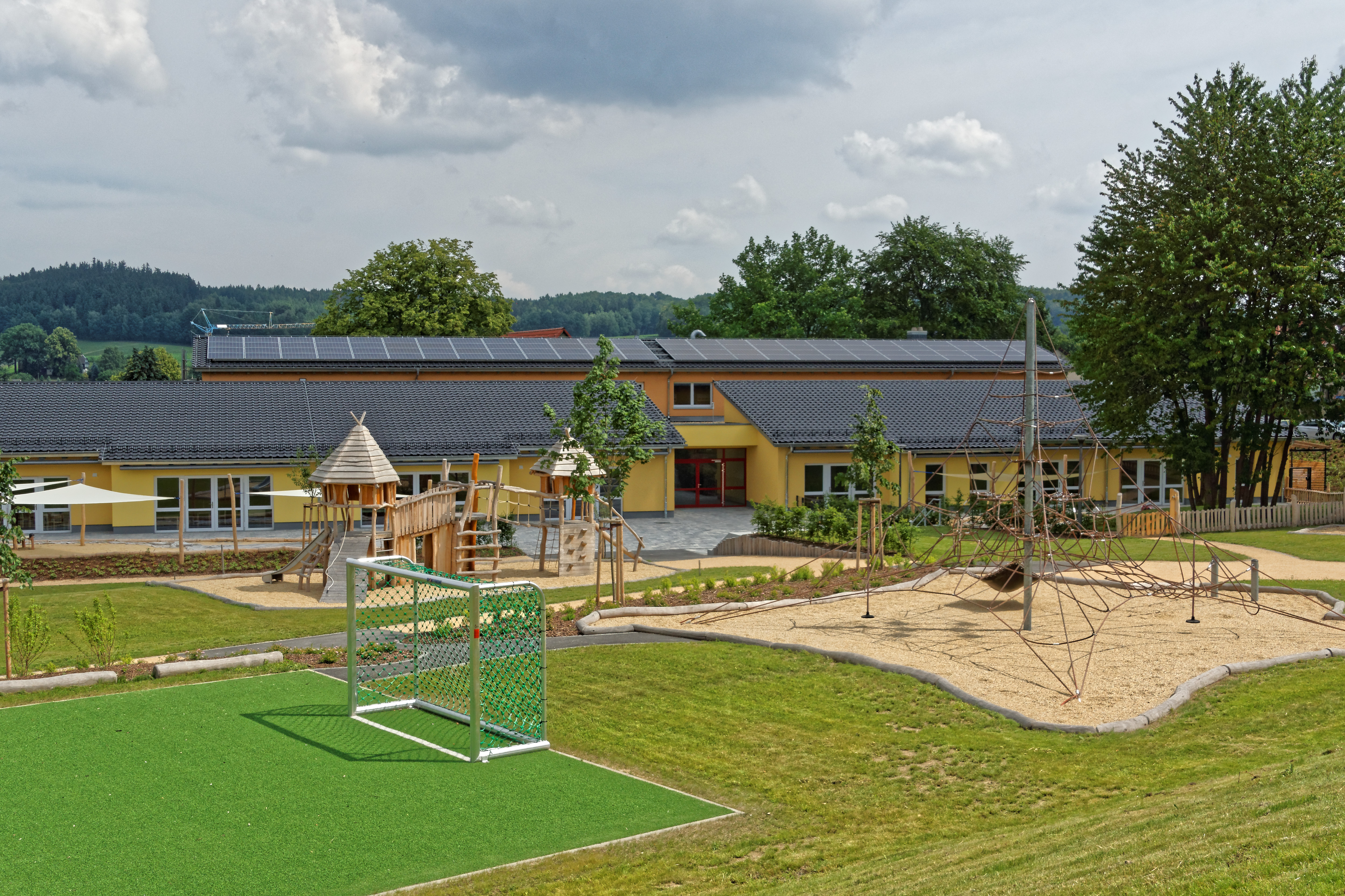 Die Einrichtung betreut Kinder vom Krippenalter bis zum Hortalter.